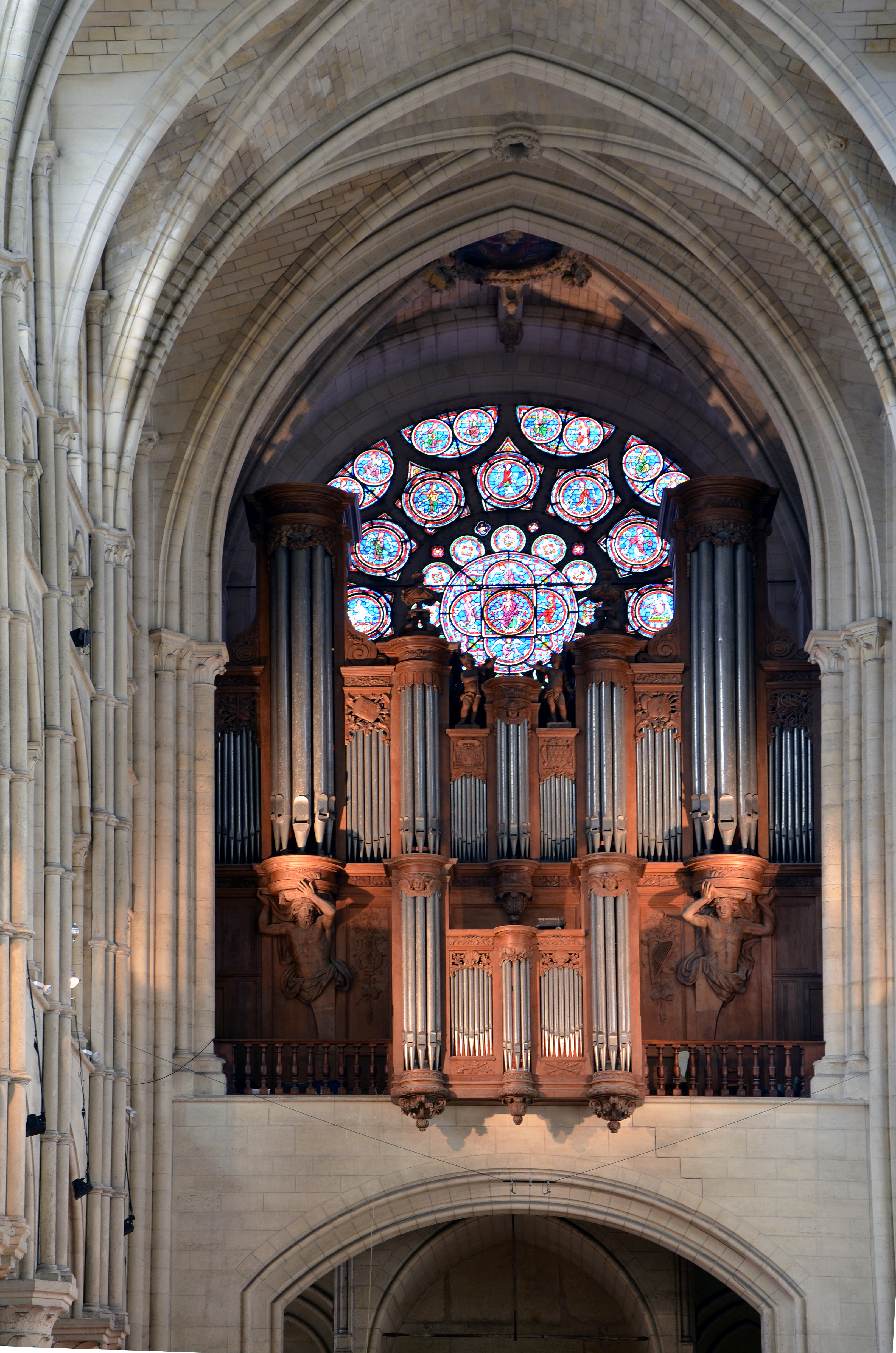 Orgue de la cathédrale de Laon, Aisne, France